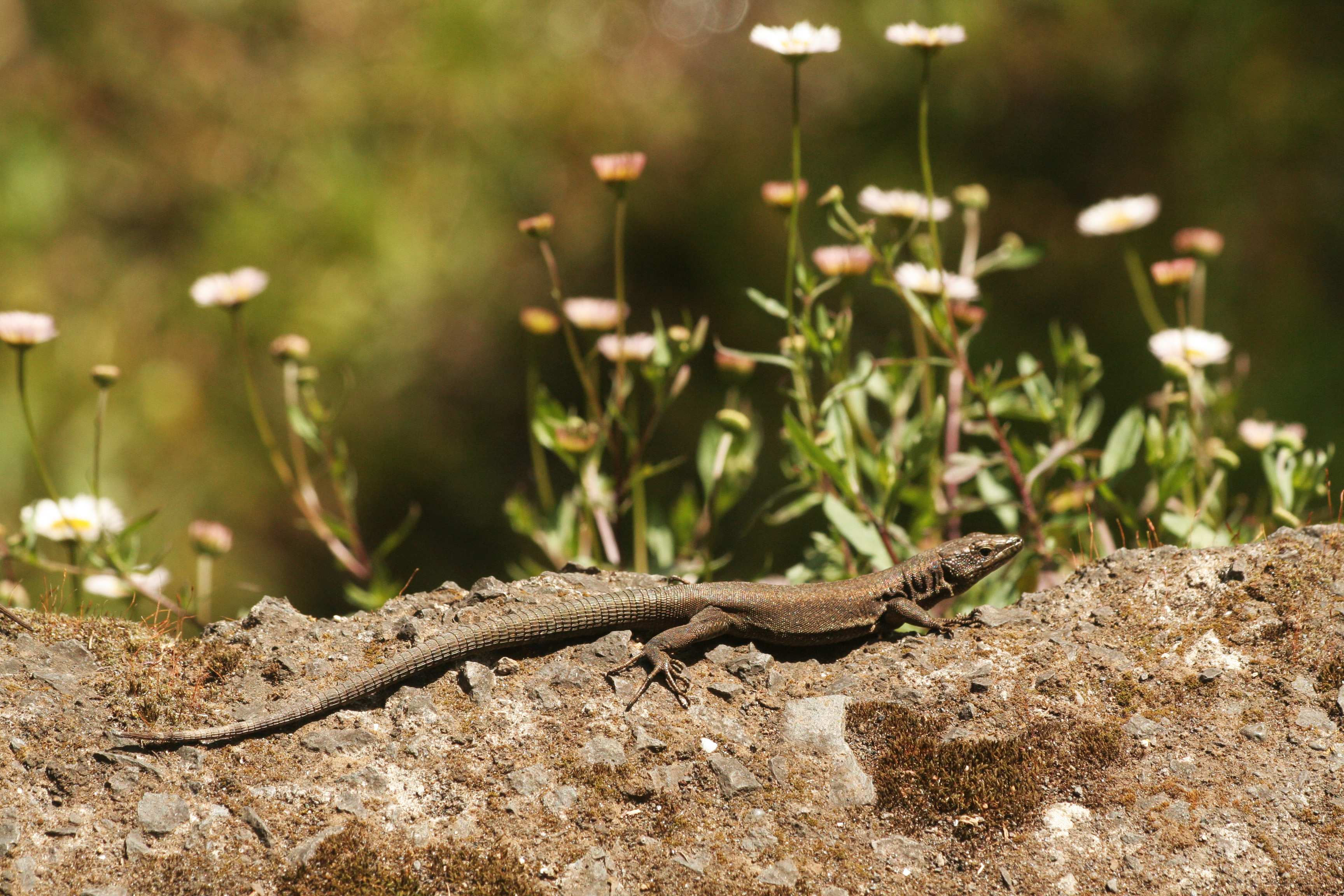 Madeira-Mauereidechsen (Teira dugesii), Madeira, Portugal, Levada do Norte in der Nähe des Encumeada-Passes